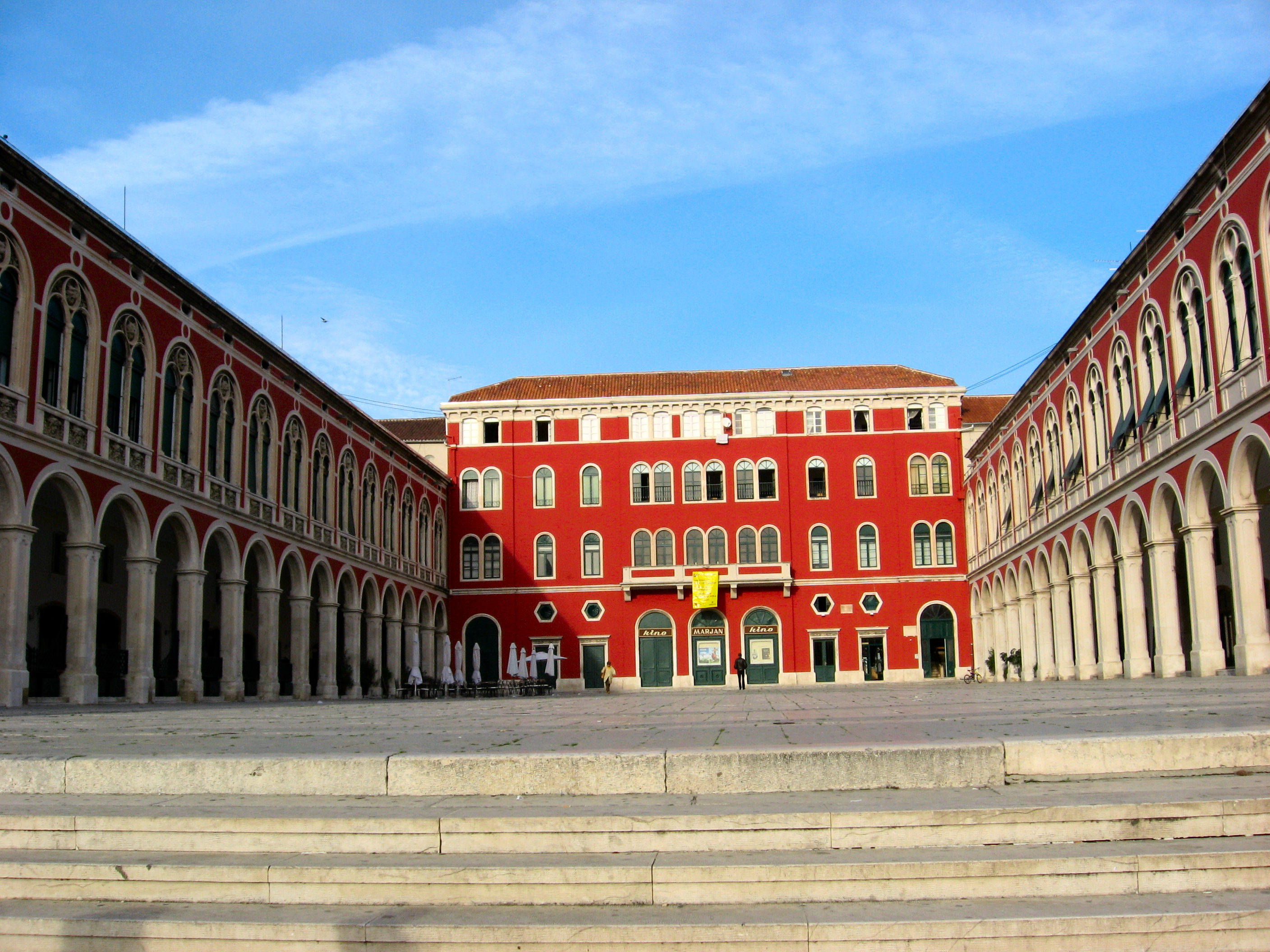 Trg Prokurative